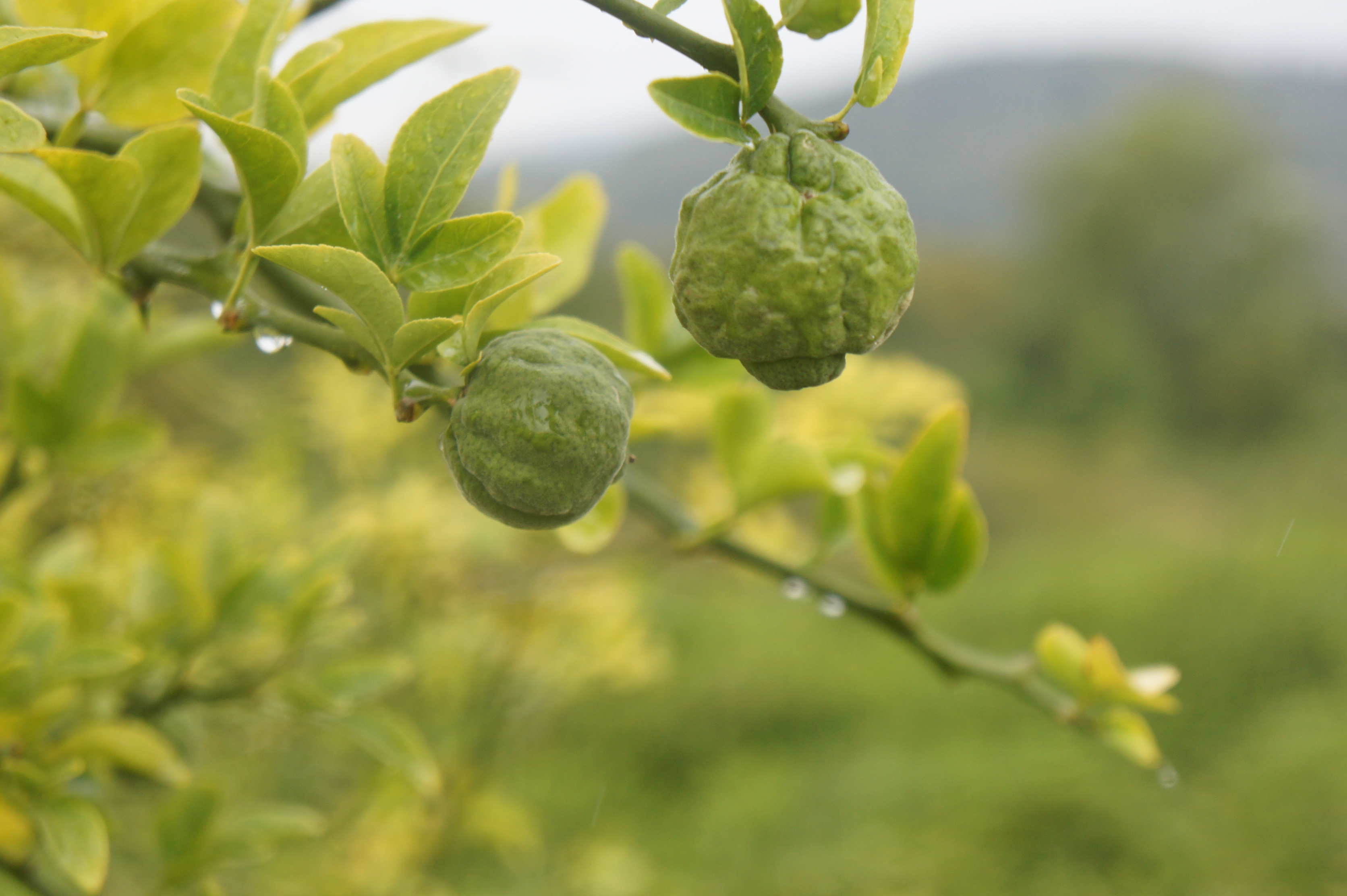 Понцирус трёхлисточковый в окрестностях города Сочи.